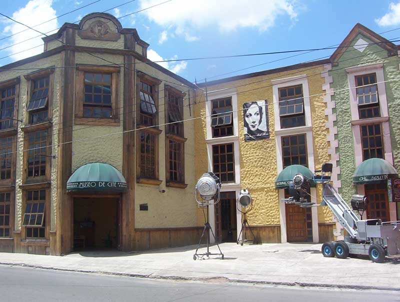 Museo temático del Cine. Salvador Barera Rodriguez Agosto 2005